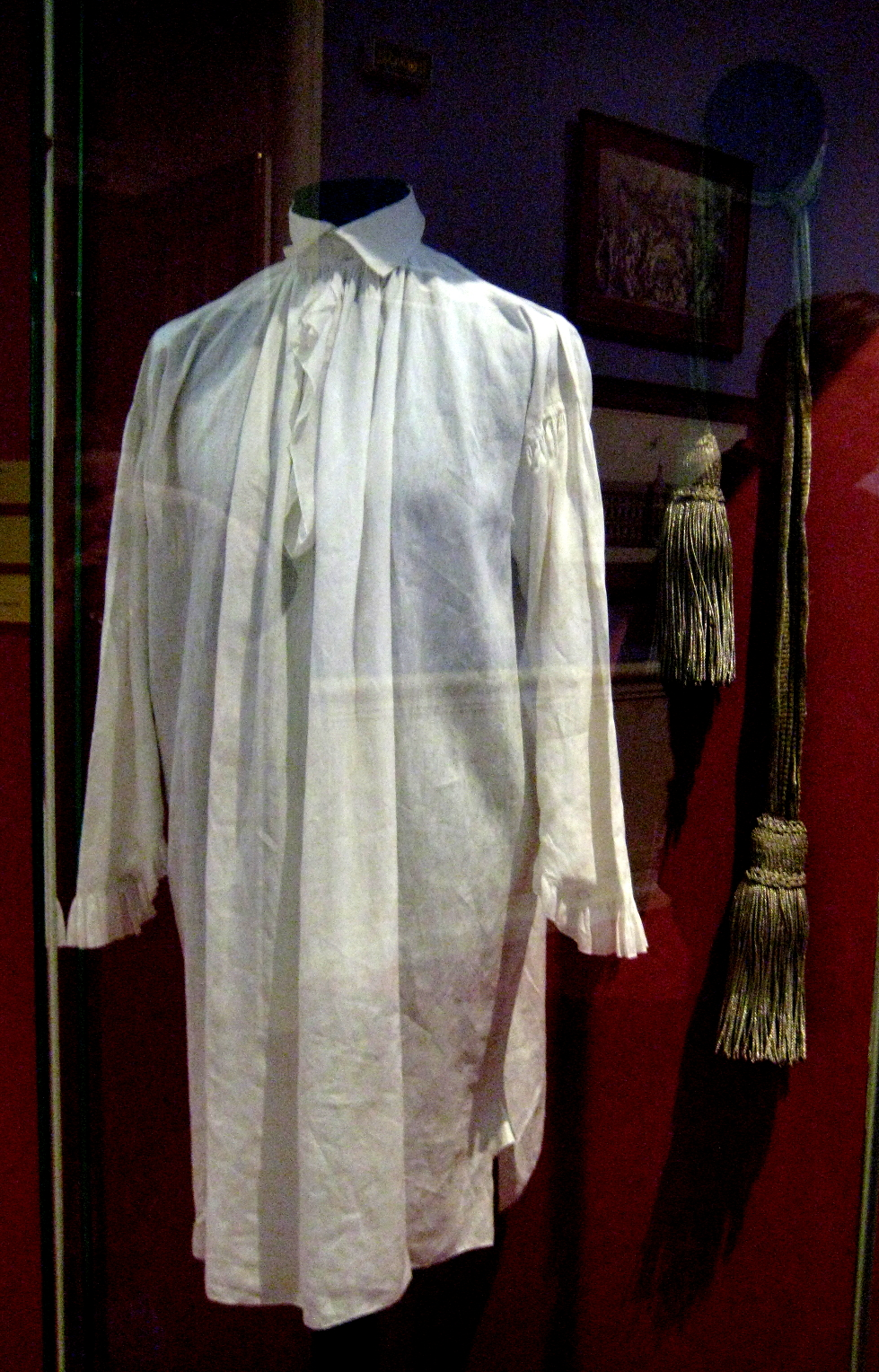 Ночная рубашка Павла I и гвардейский шарф (аналогичный орудию убийства). Выставка "Павел I", Царицыно